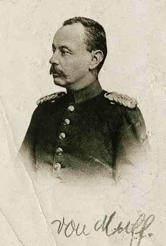 Karl von Muff, Generalleutnant in Uniform, Brustbild in Halbprofil (Landesarchiv Baden-Württemberg, Hauptsstaatsarchiv Stuttgart, Bestand M 703: Militärhistorische Bildersammlung, 6.2.4.2 Politisch-militärisch hervorgehobene Zeitgenossen, R958N25)